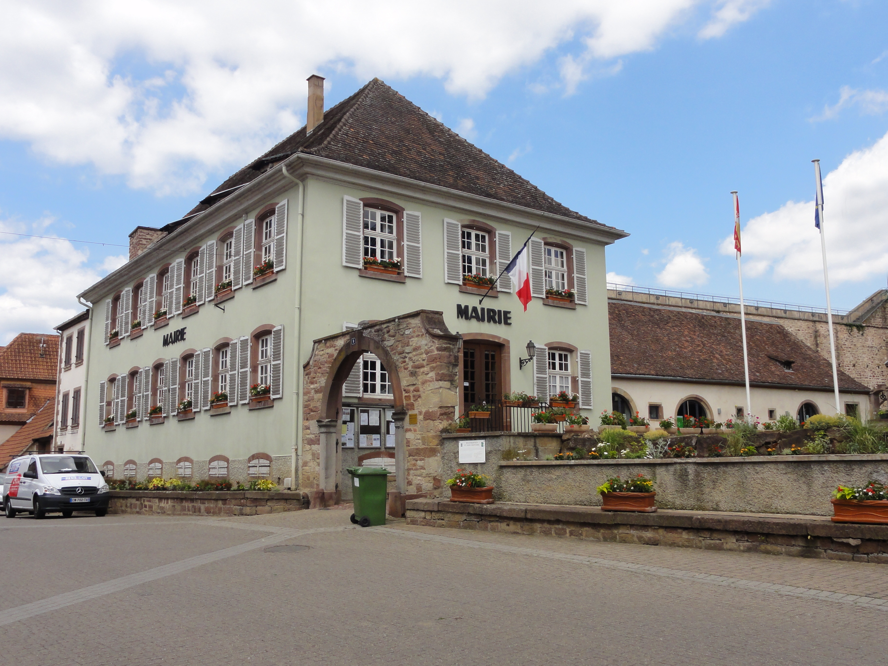 Alsace, Bas-Rhin, Westhoffen, Mairie, ancienne maison (XVIIIe), 9 rue Staedtel.